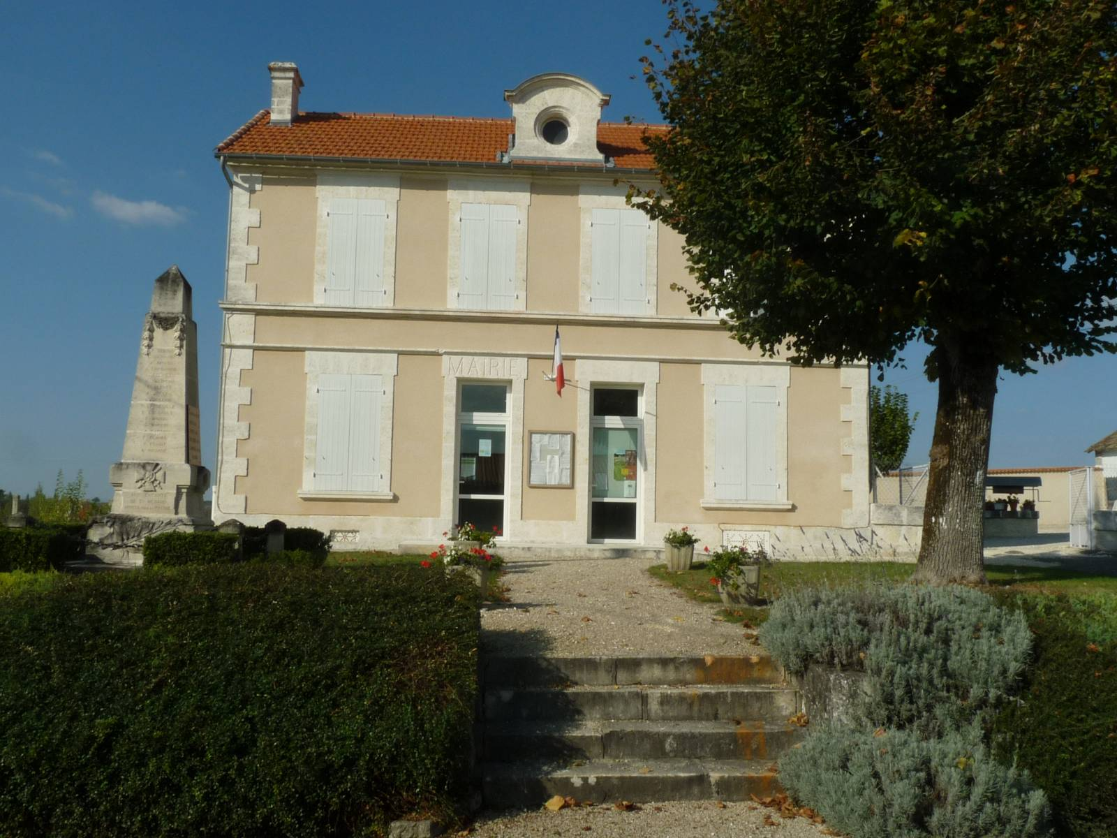 mairie de St-Médard près Barbezieux (16), France